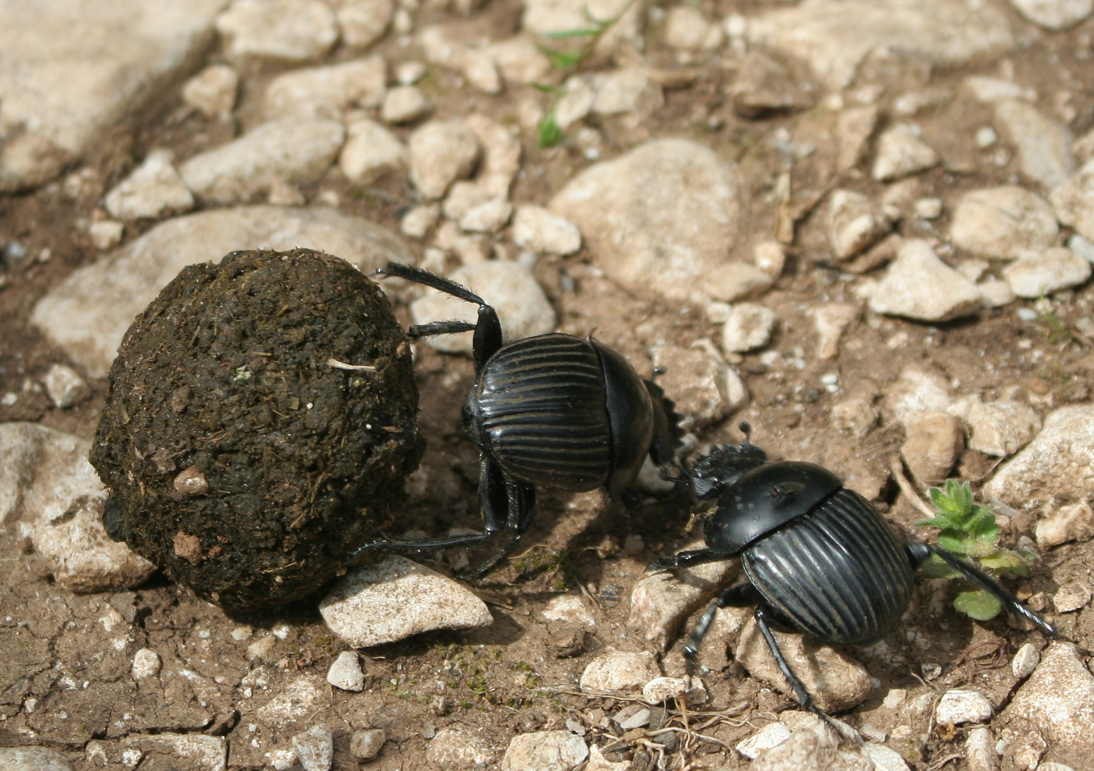 Scarabaeus laticollis near a nuraghe near Monte Tiscali, Sardinia, Italy